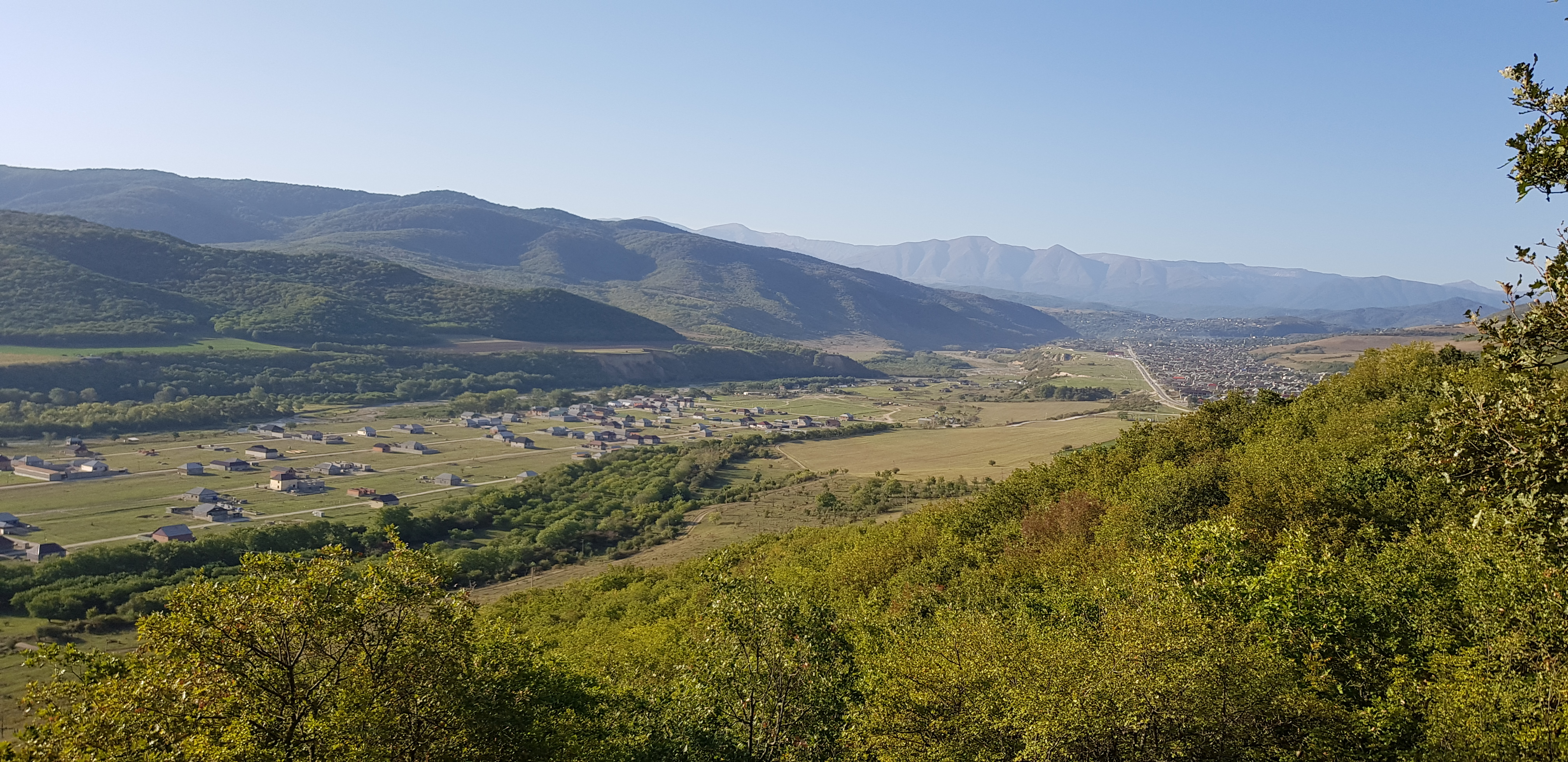 Ауховское село Бурсун (слева)